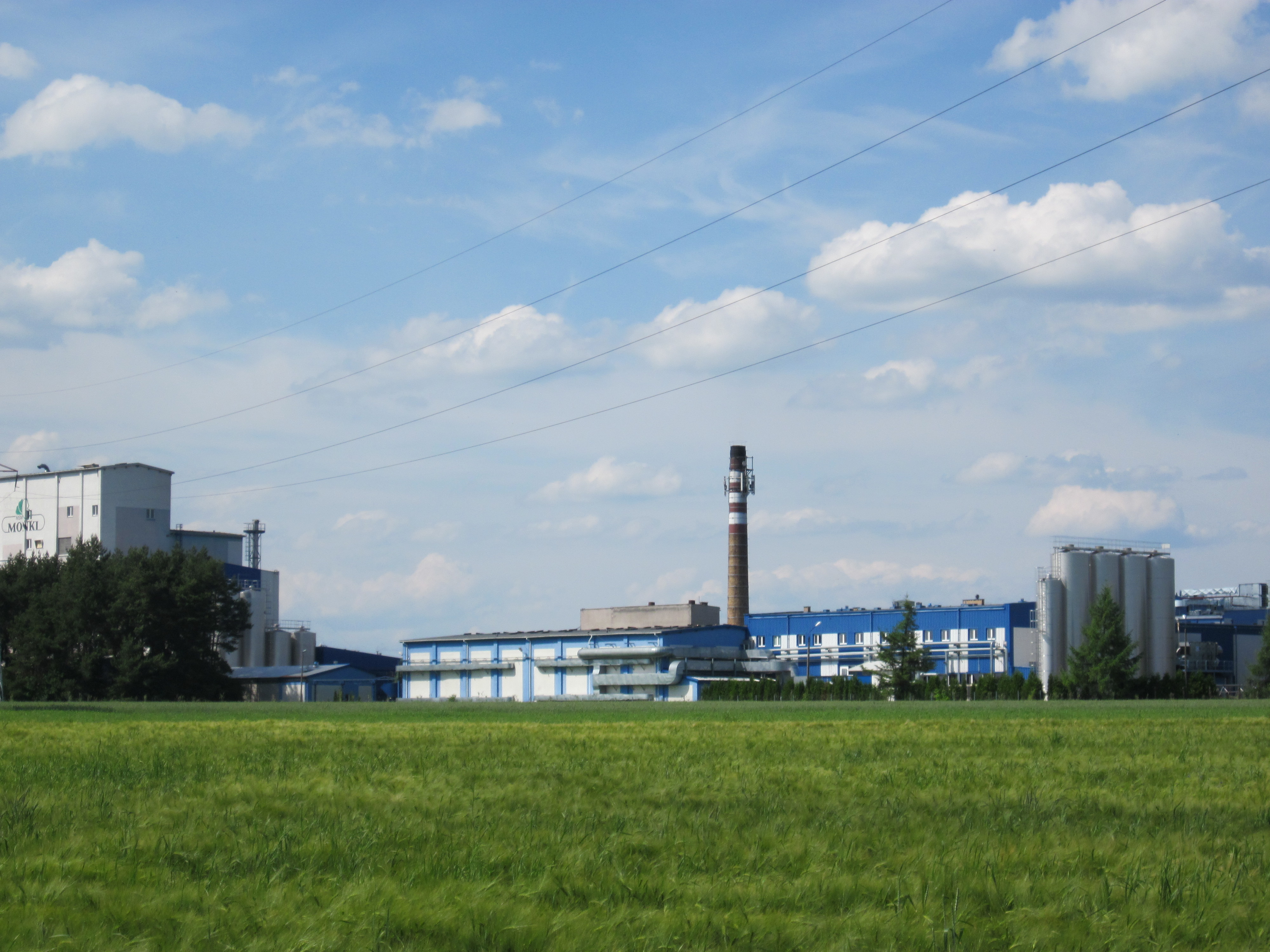 MSM - Moniecka Spółdzielnia Mleczarska widok z ul. Białostockiej